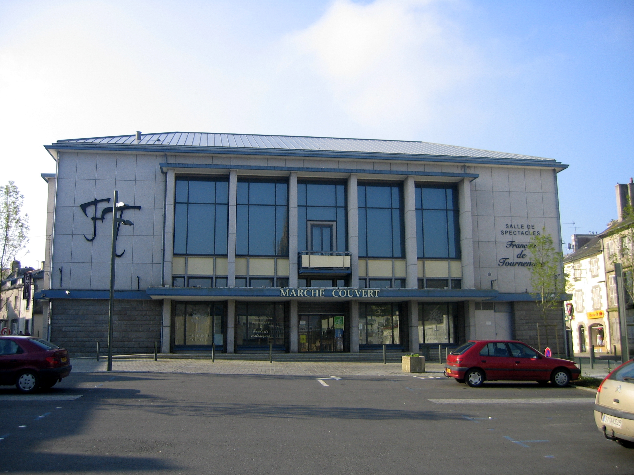 Le marché couvert de Landivisiau dans le Finistère